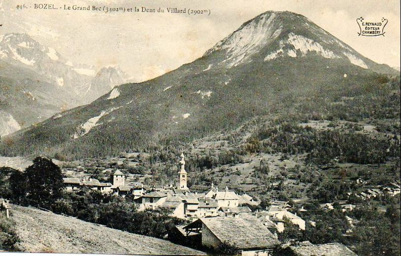 Vue sur la Dent du Villard depuis le village de Bozel